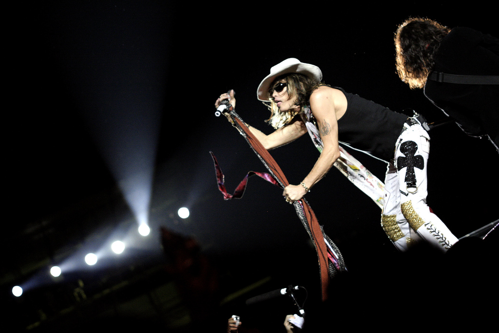 Aerosmith - Steven_TylerSteven_Tyler